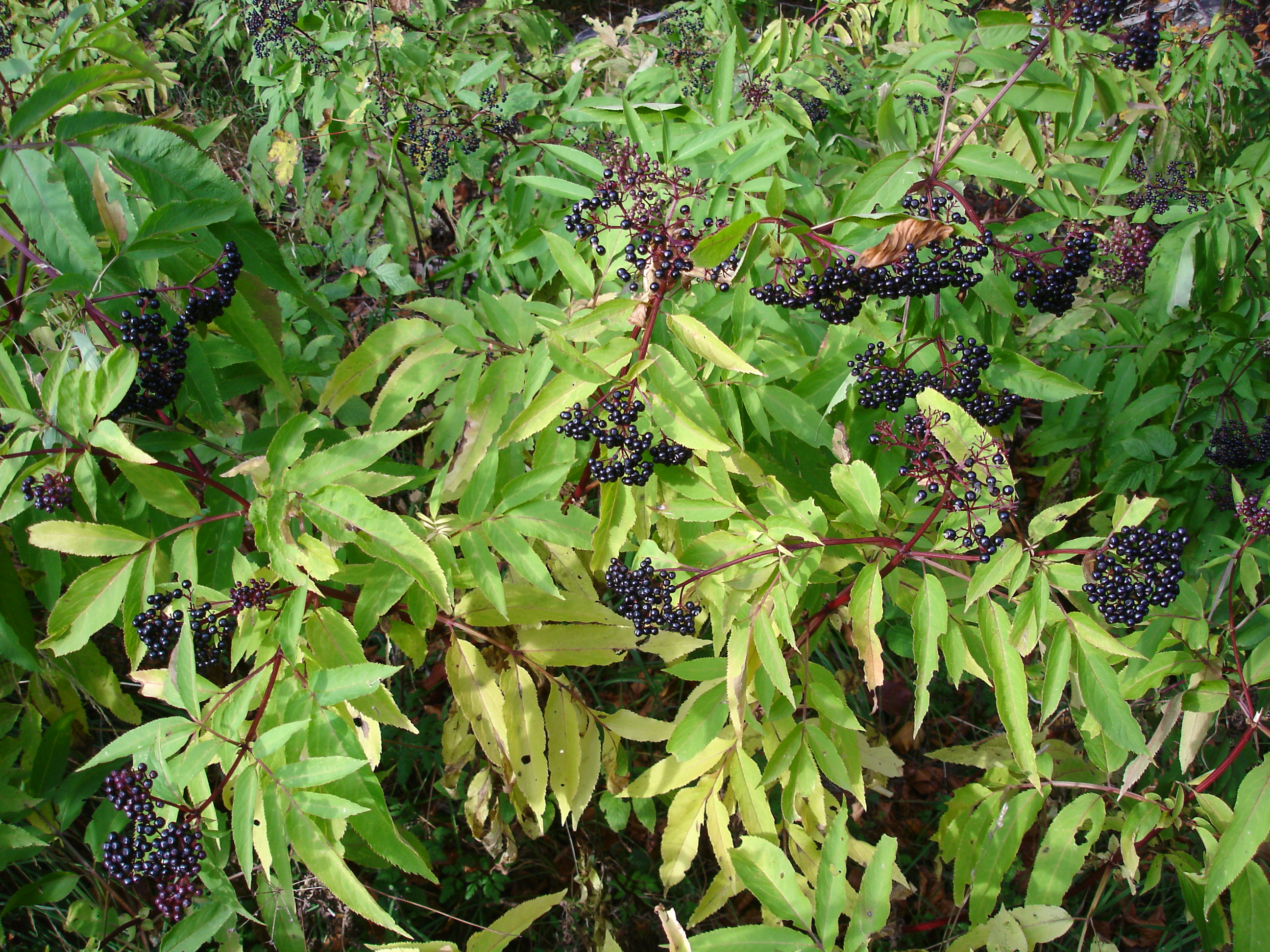 Sambucus nigra in Vitosha, Bulgaria